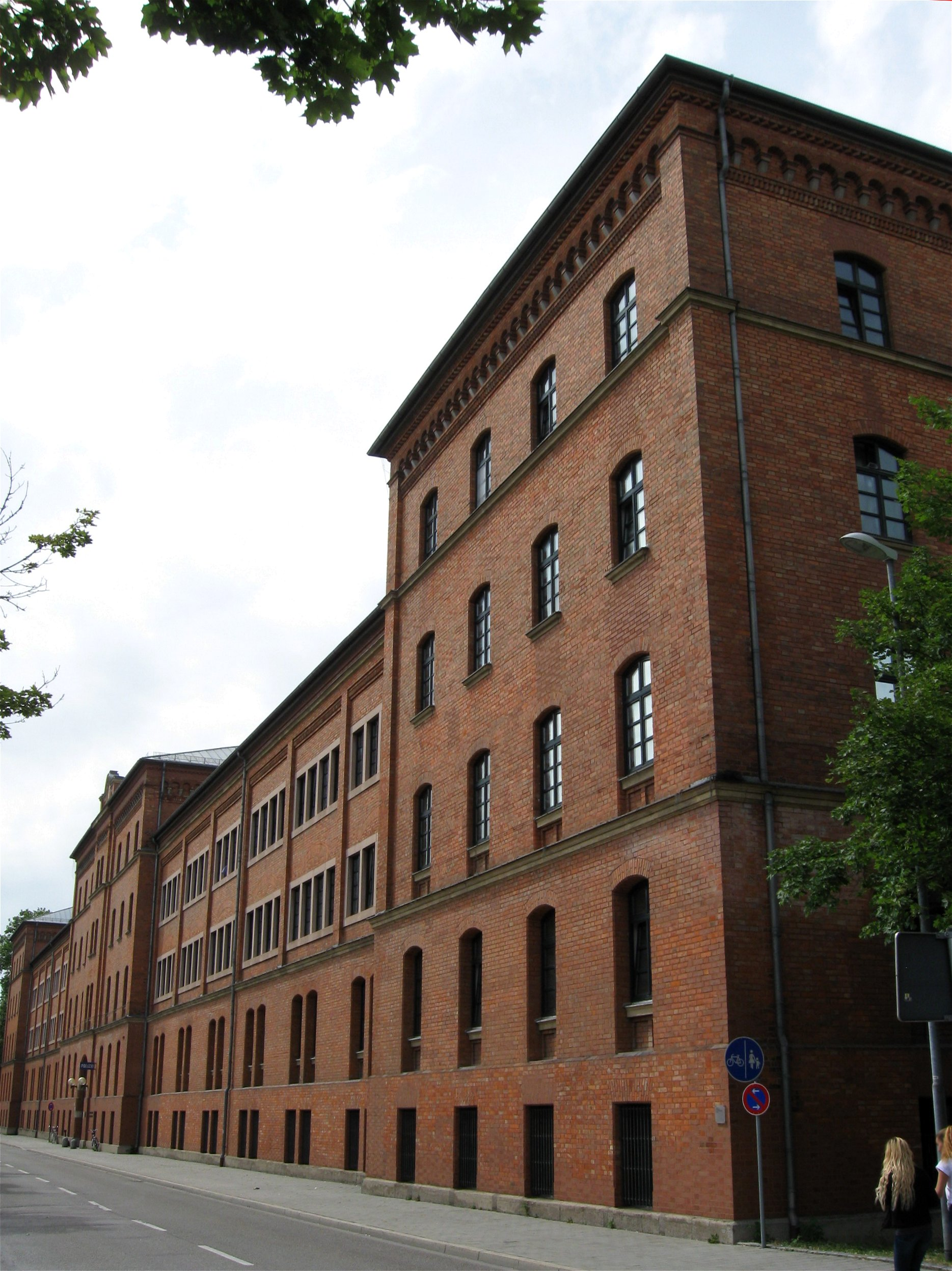 Esplanade 38, 40; Friedenskasernen, ehemalige Kasernen, sog. Friedenskasernen, zwei langgestreckte, in Disposition und Fassadengliederung identische Trakte in Sichtziegelmauerwerk mit flachen Walmdächern, jeweils aus einem viergeschossigen Hauptbau, viergeschossigen Eckbauten und dreigeschossigen Verbindungsbauten bestehend, erbaut 1878-80, Inneres 1980-84 vollständig entkernt und neu strukturiert; Pulvermagazine, zwei langgestreckte Bauten mit Satteldächern und verzahnter Eckquaderung, erbaut 1848, das östliche heute als Russisch-Orthodoxe Kirche (St. Nikolaus) genutzt. D-1-61-000-109